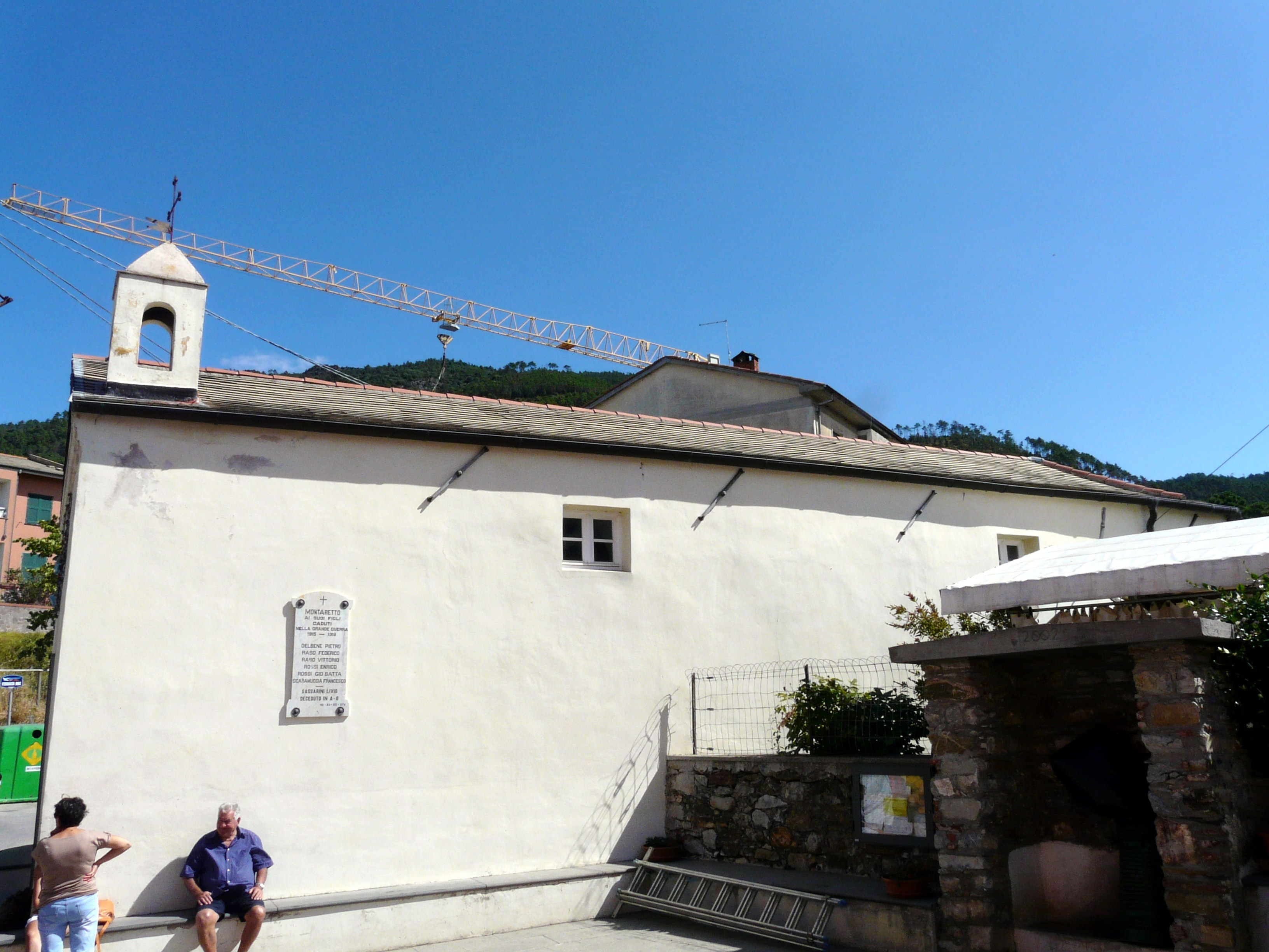 L'oratorio di San Rocco, Montaretto, Bonassola, Liguria, Italia